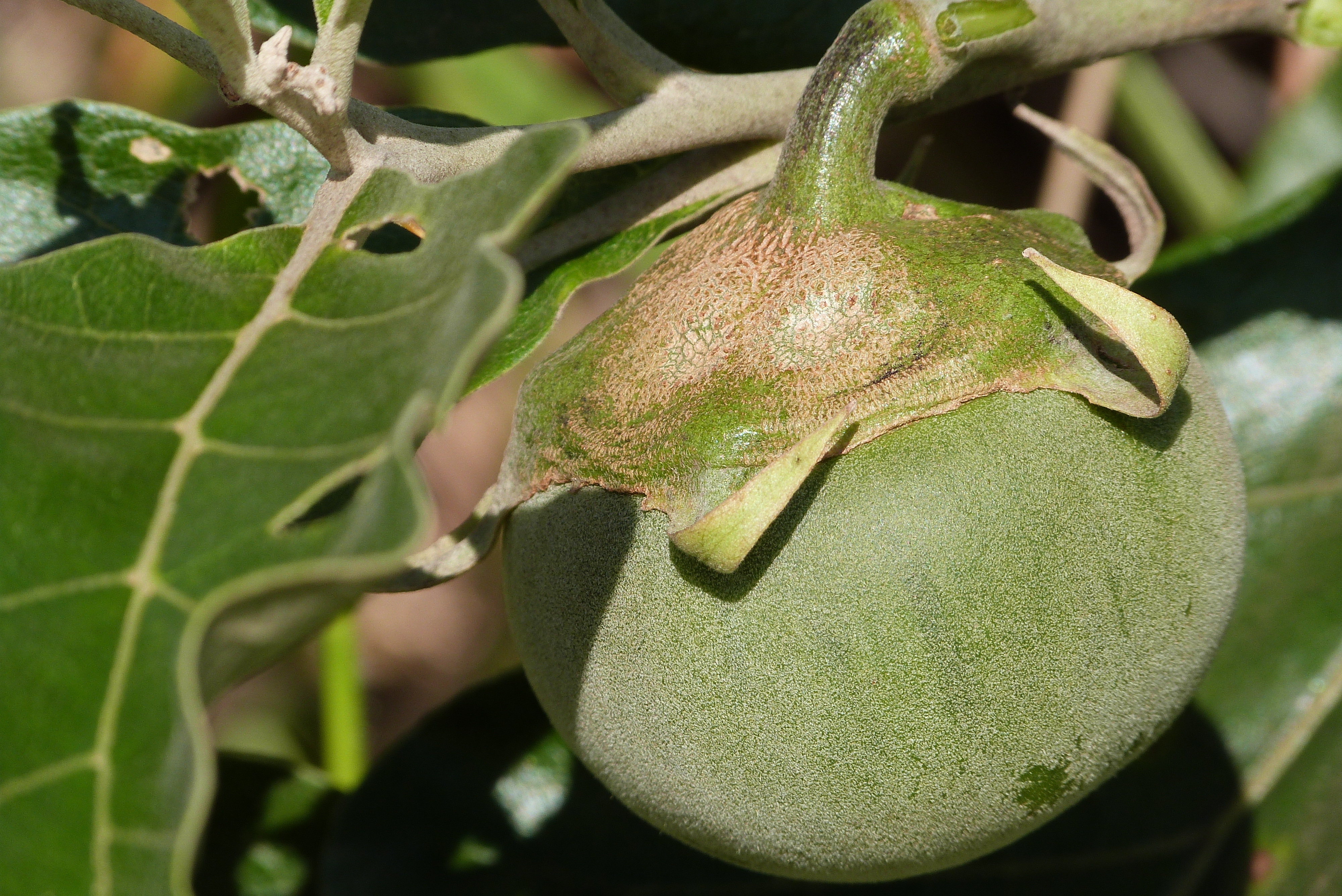 Foto tirada no parque Estadual do Juqueri - SP